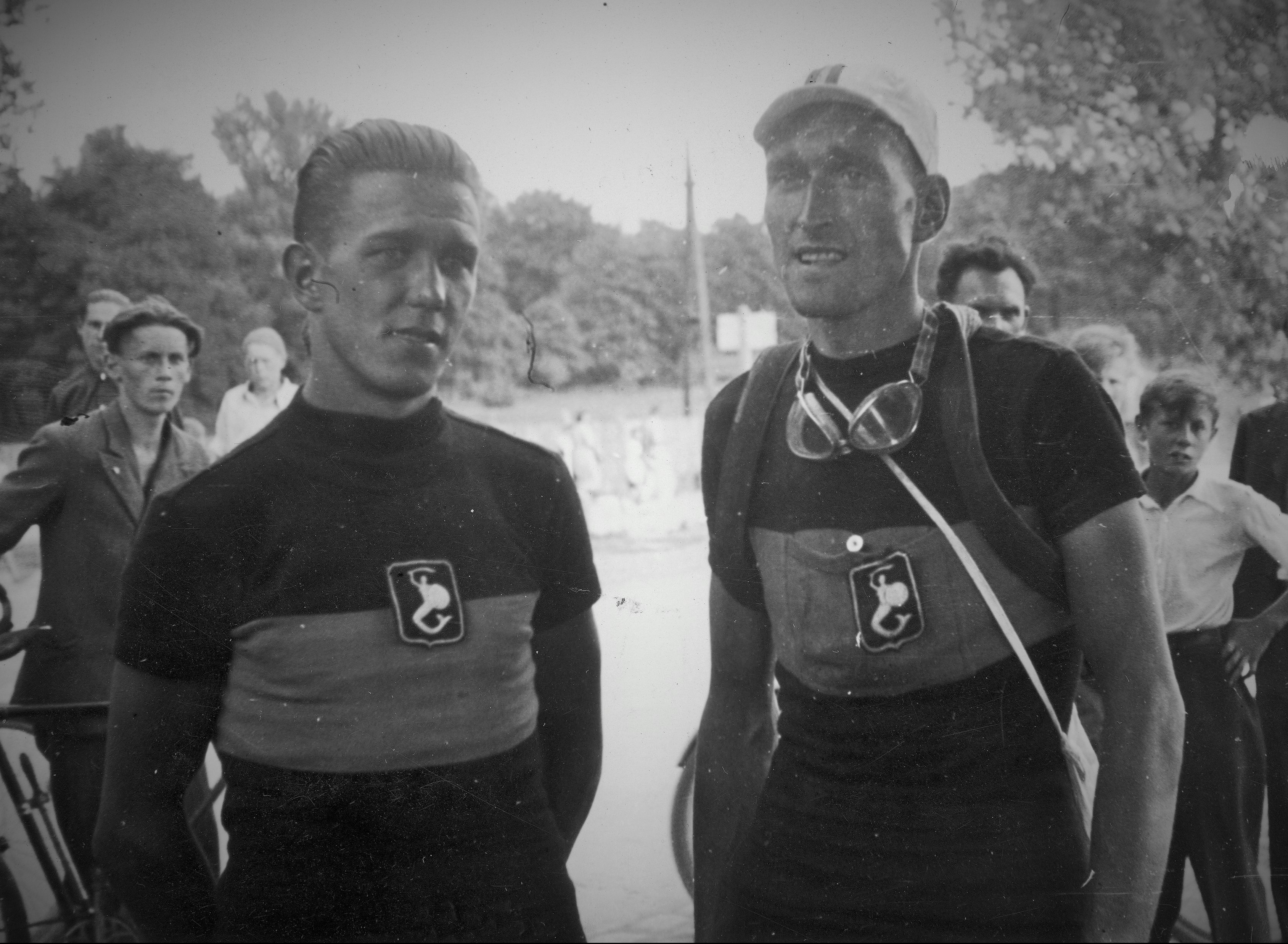 Drużynowe mistrzostwa Polski w kolarstwie szosowym na Bielanach w Warszawie 1938. Kolarze zwycięskiej drużyny z klubu Syrena Warszawa: Eugeniusz Michalak i Bolesław Napierała (z prawej).